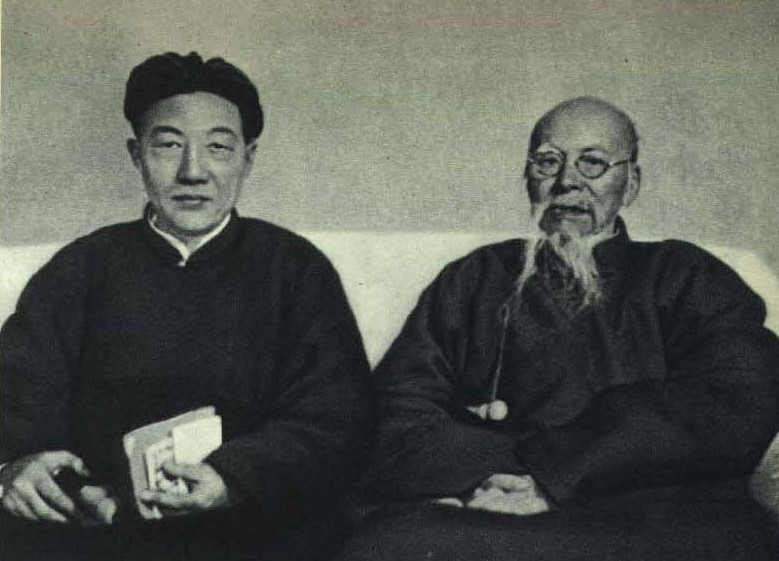 1963-12 徐悲鸿 齐白石合影